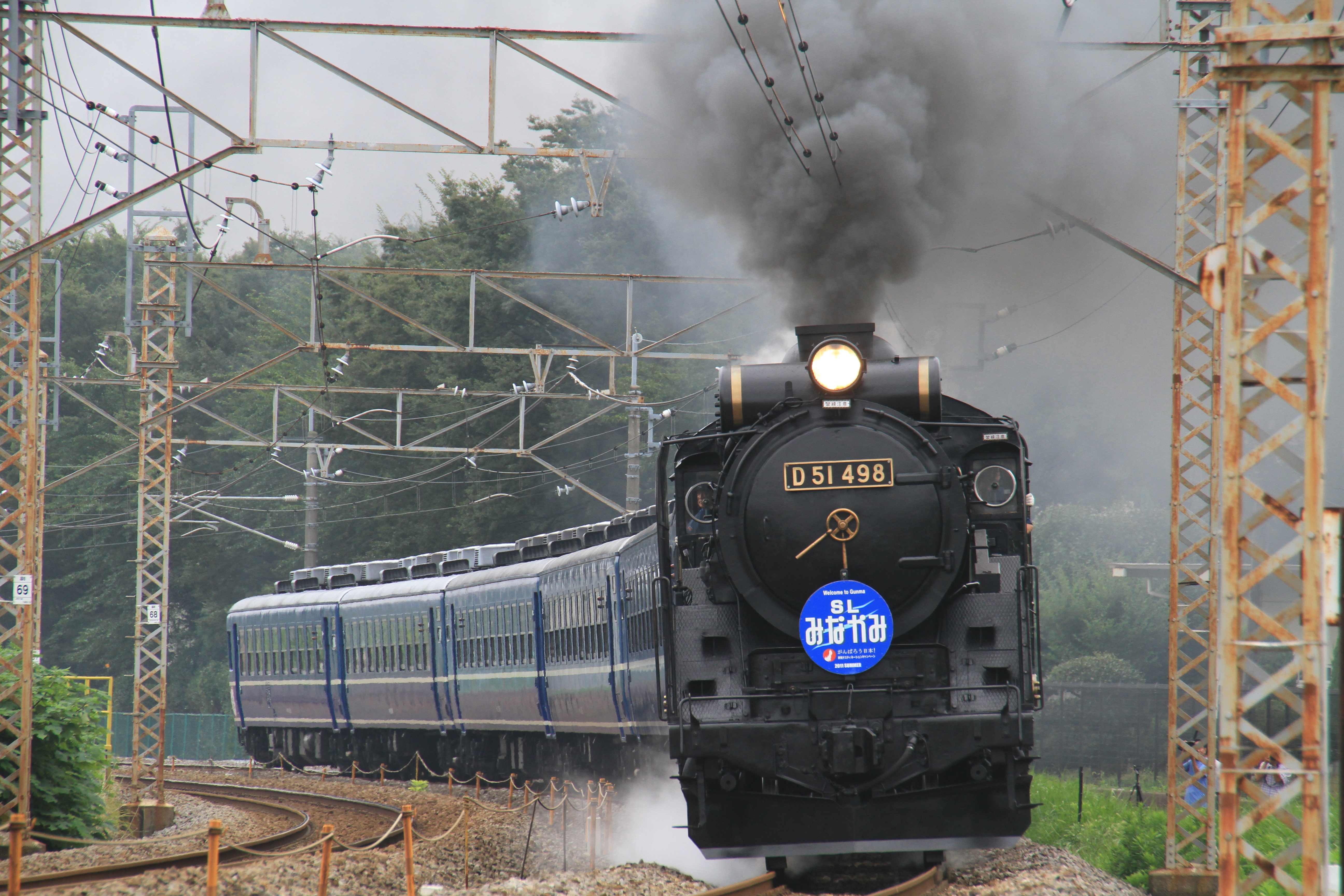 SLみなかみ1号